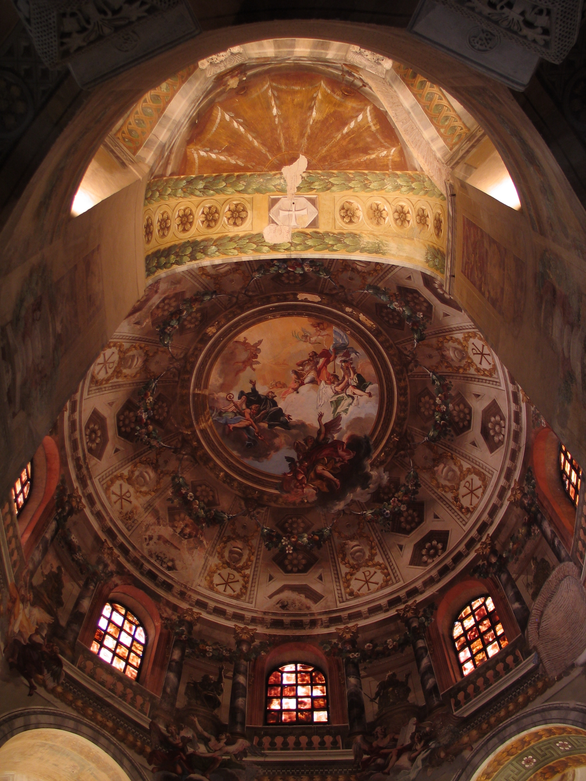 Die ausgemalte Kuppel der zum UNESCO-Weltkulturerbe gehörenden San Vitale aus dem 6. Jh. n. Chr. in Ravenna, Italien.